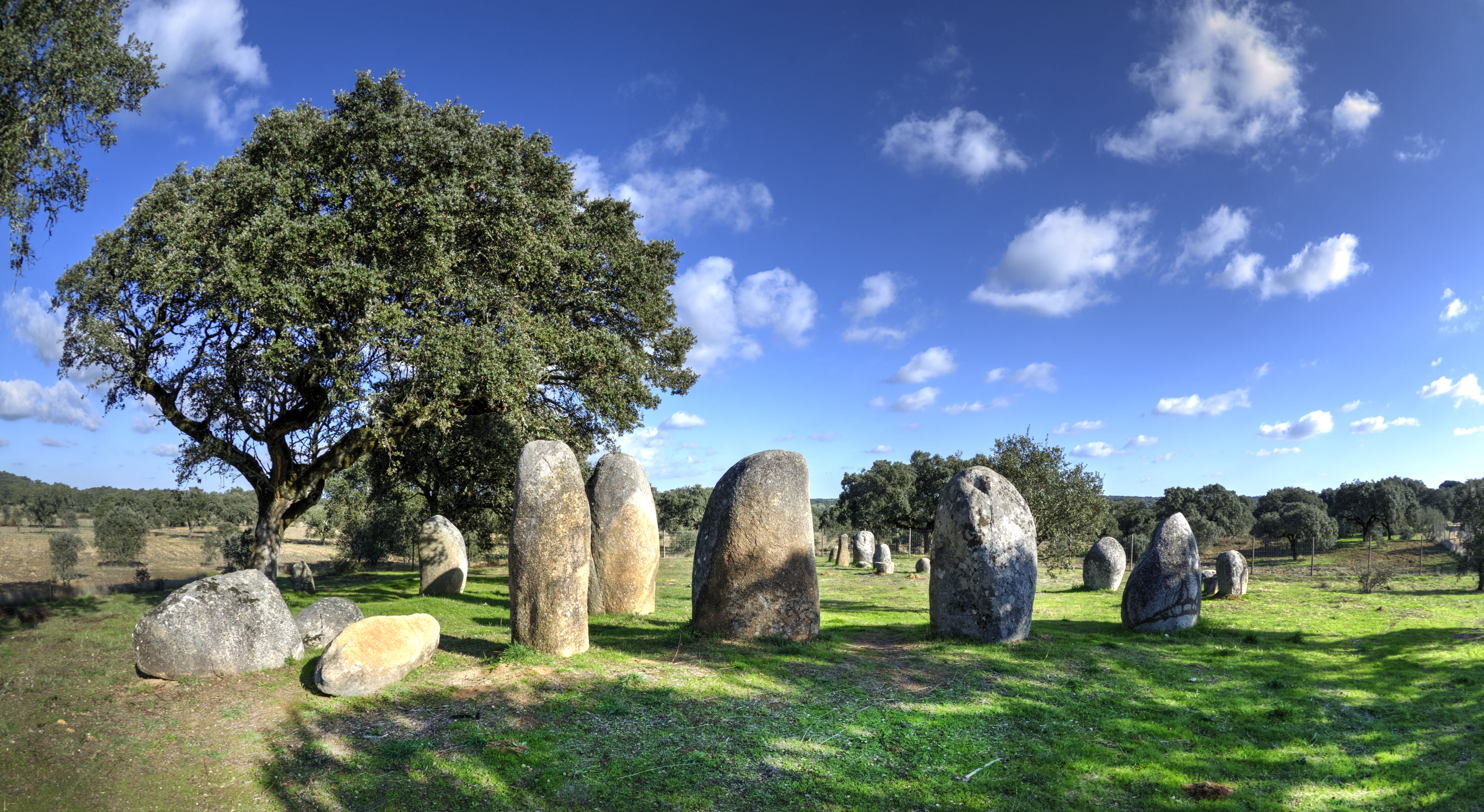 Cromlech que está a unos 15 km de Évora (Alentejo, Portugal). En este "concelho" se han encontrado otros dos: el de Almendres (ya fotografiado) y el de Portela dos Mogos. Se descubrió en 1993 y forma un recinto de 37x25 m del que forman parte unos 30 monolitos de tamaño diverso.